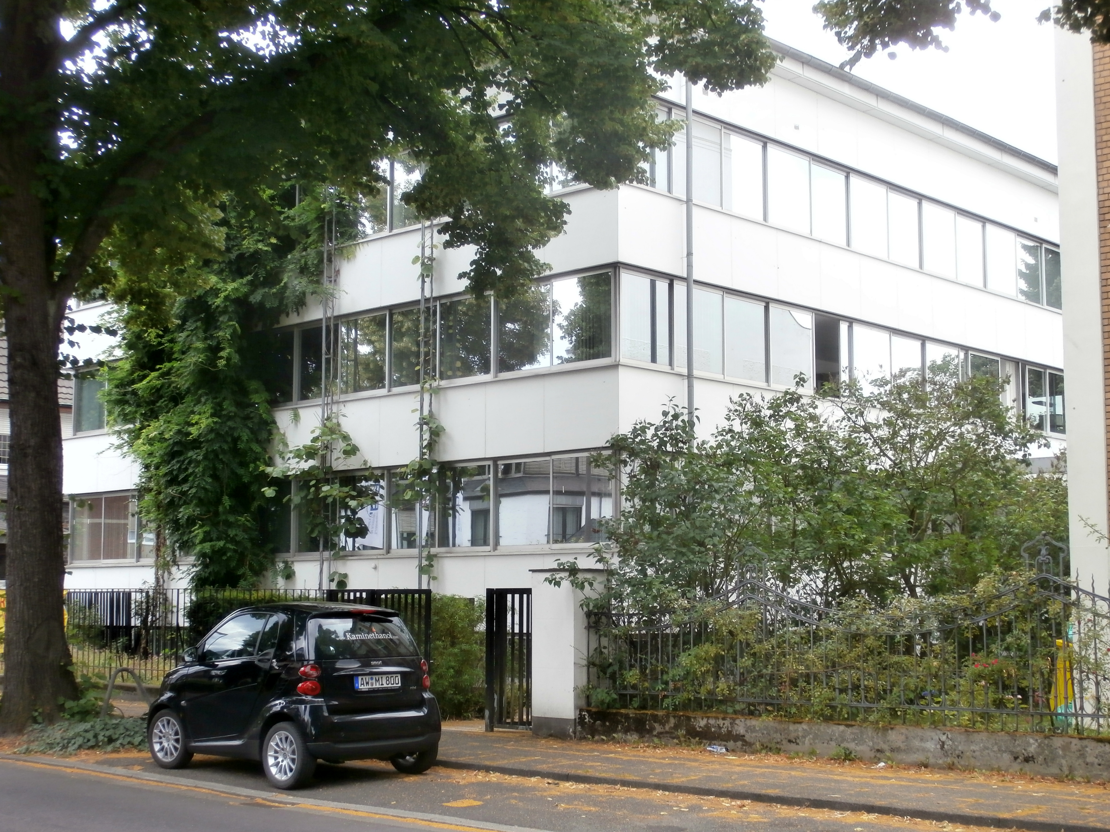 Ehemaliges Kanzleigebäude der Botschaften von Portugal und Israel, Ubierstraße 78, Godesberg-Villenviertel, Bad Godesberg